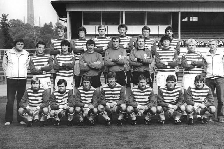 ADN-ZB-Kasper-16.9.83-zin-Bez. Gera: Die Mannschaft des FC Carl Zeiss Jena für die Fußball-Oberligasaison 1983-84. Vorn v.l.n.r. Matthias Pittelkow, Wolfgang Schilling, Robby Zimmermann, Konrad Weise, Andreas Krause, Gert Brauer und Thomas Töpfer. Mitte stehend v.l.n.r.: Trainer Hans Meyer, Jürgen Köberlein, STefan Meixner, Torhüter Karsten Härtel, Torhüter Hans-Ullrich Grapenthin, Torhüter Perry Bräutigam, Heiko Peschke, Martin Trocha und Trainer Helmut Stein. Hinten stehend v.l.n.r.: Thomas Ludwig, Jürgen Raab, Andreas Bielau, Gerhard Hoppe, Mannschaftskapitän Rüdiger Schnuphase und Jörg Burow. Die Jenaer Elf erreichte im Hinspiel der 1. Runde des Fußball-UEFA-Pokals am 13.9.83 bei IB Veastmannayejar in Reykjavik ein 0:0 und empfängt die Isländer am 28.9.83 zum Rückspiel im heimischen Ernst-Abbe-Sportfeld.